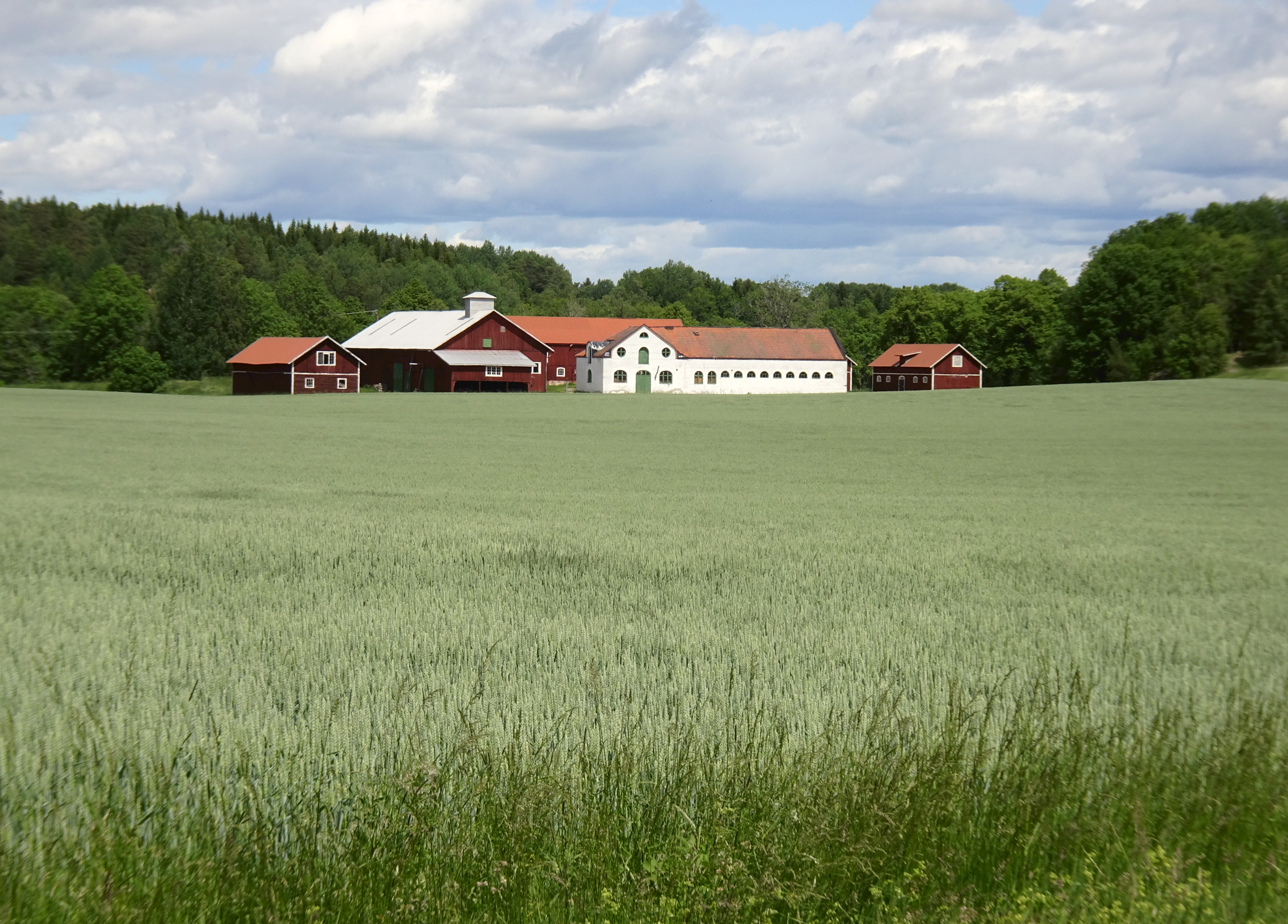 Farsta säteri, Södertälje kommun, ekonomibyggnader